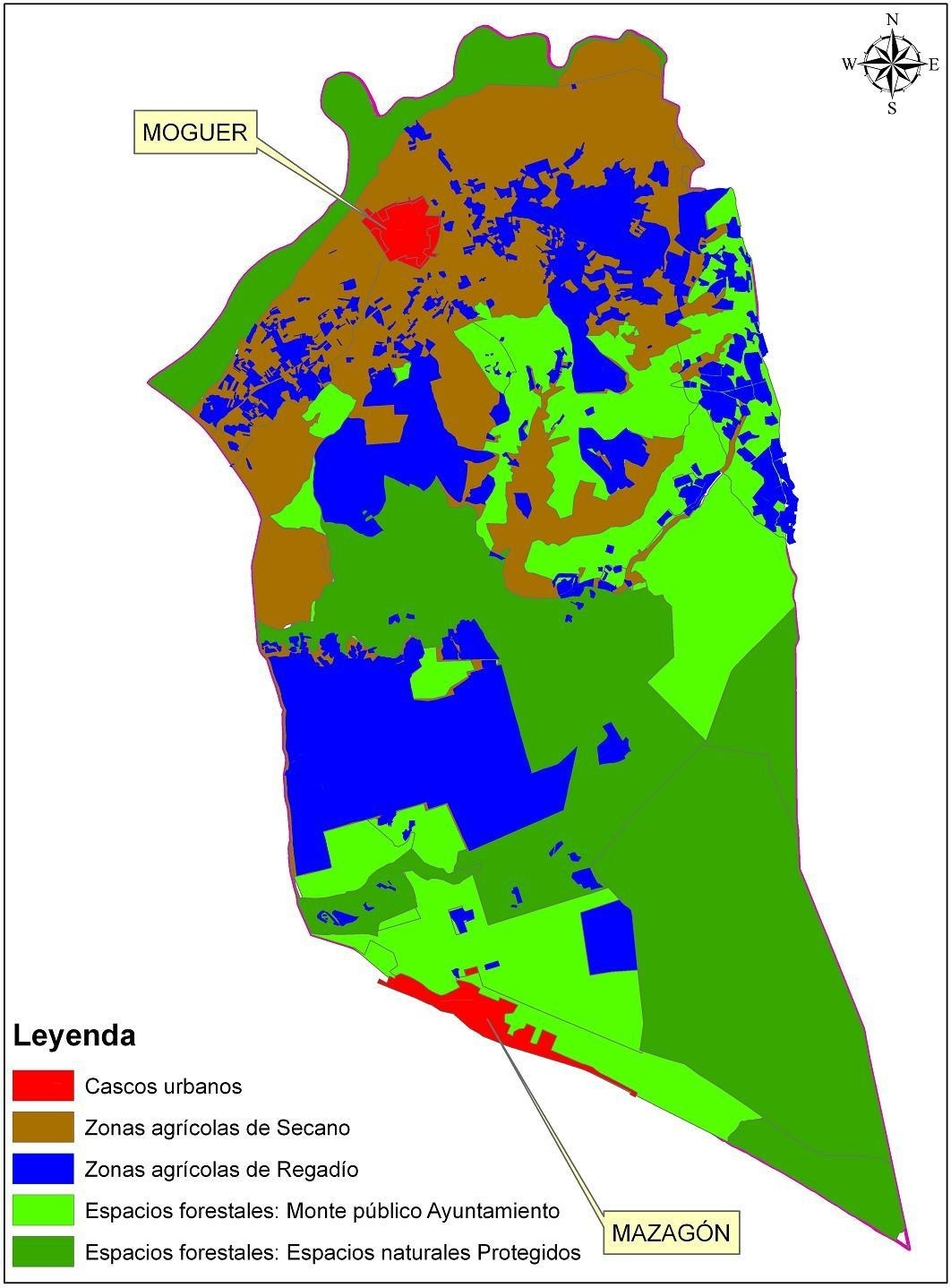 Plano de distribución del municipio de Moguer (España).